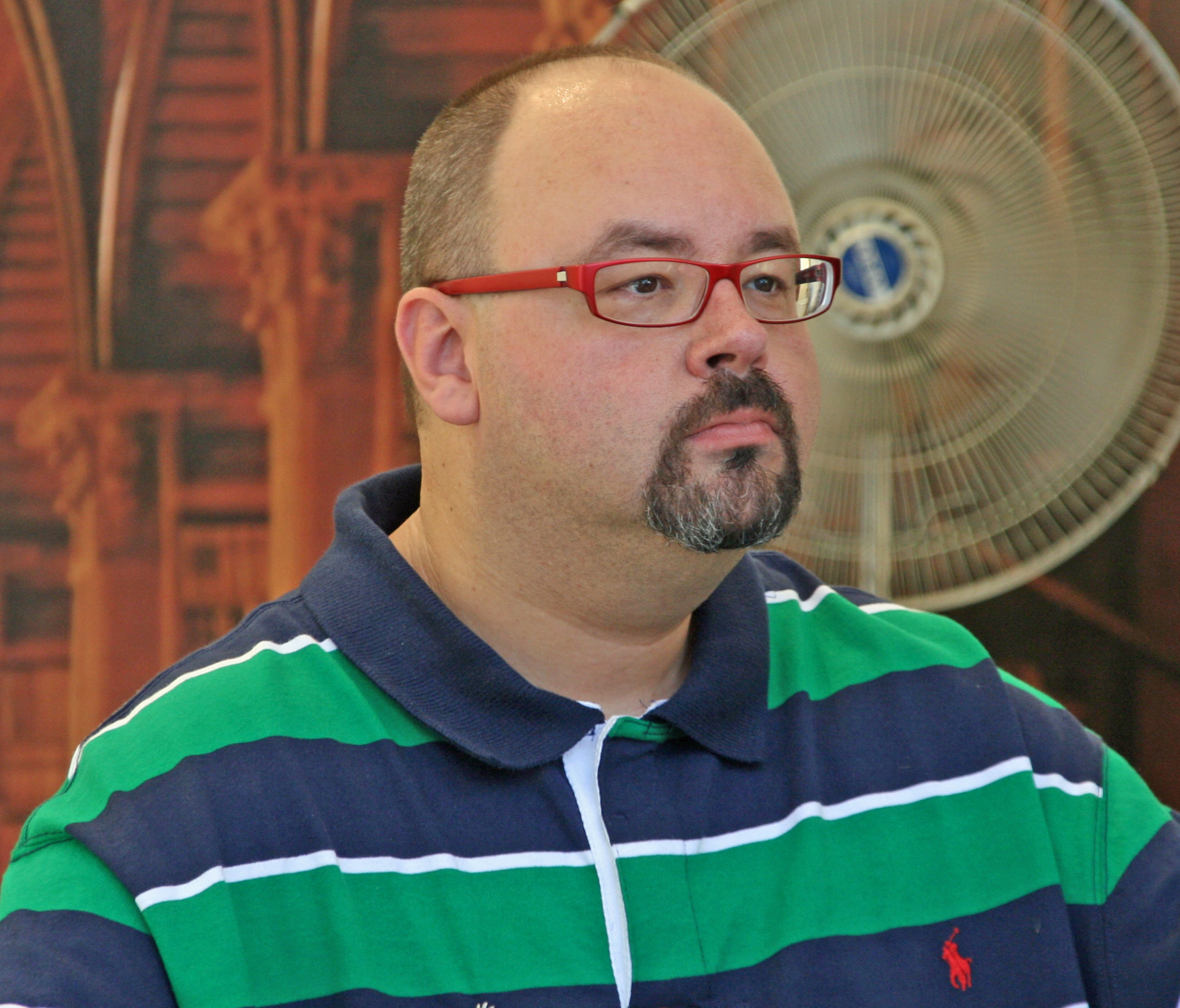 Carlos Ruiz Zafón en la Feria del Libro de Madrid, 6 de junio de 2008.